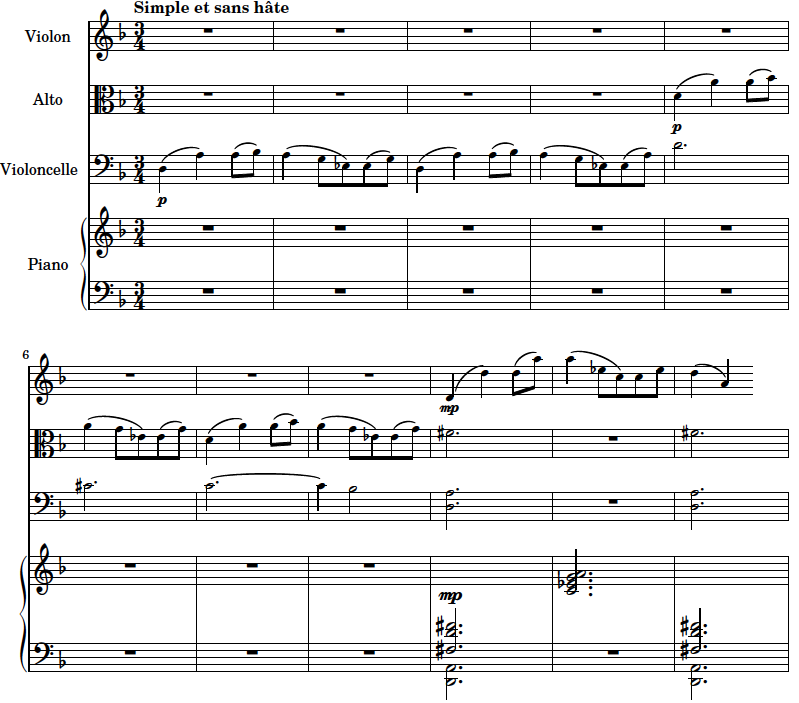 Exemple 1 créé avec Lilypond